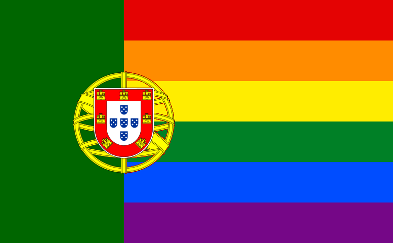 Bandera gay Portugal.